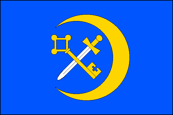 vlajka, Voděrady, okres Rychnov nad Kněžnou